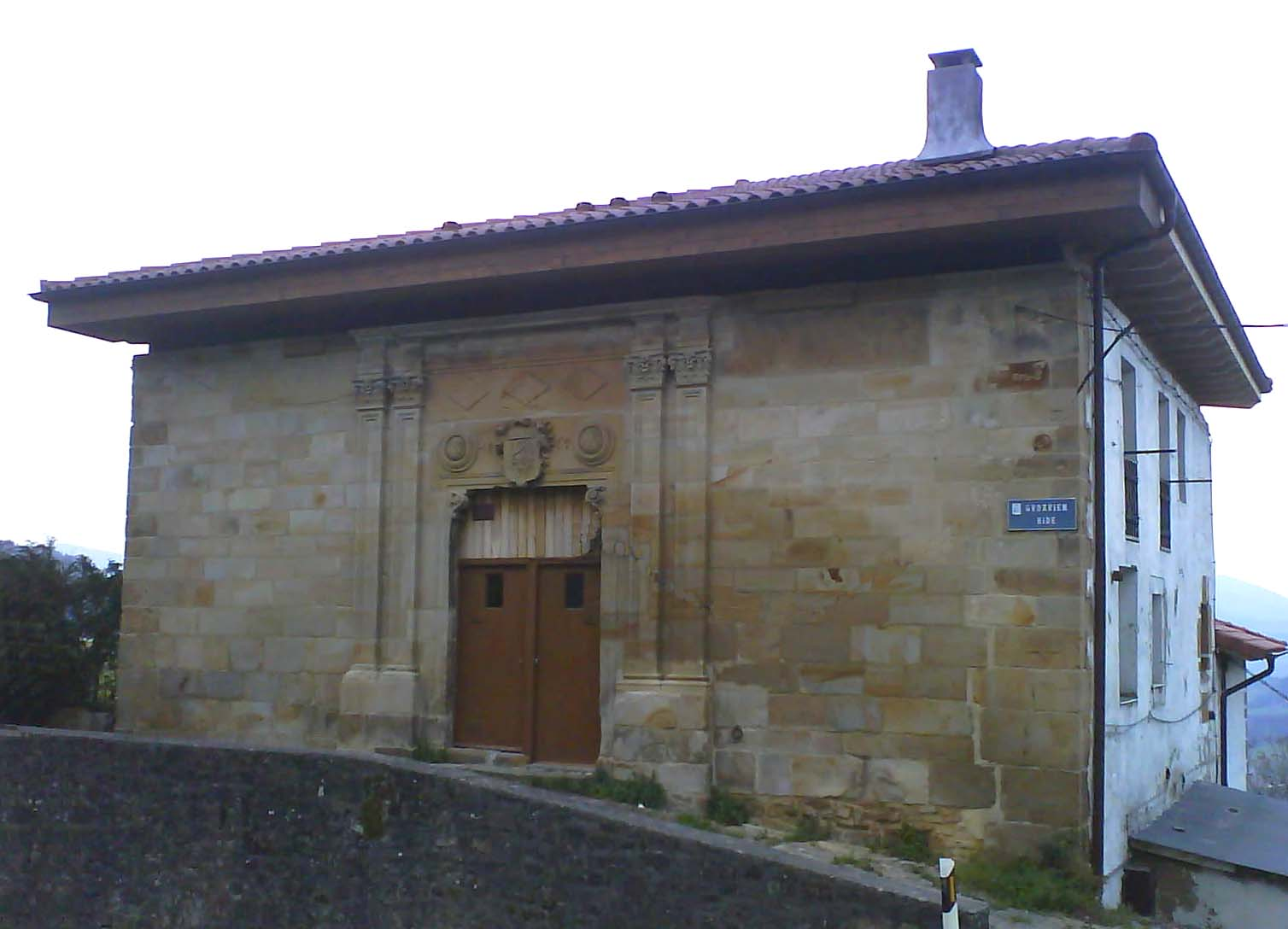 La torre de Urrupain de Elgueta, Guipúzcoa (País vasco) (España).